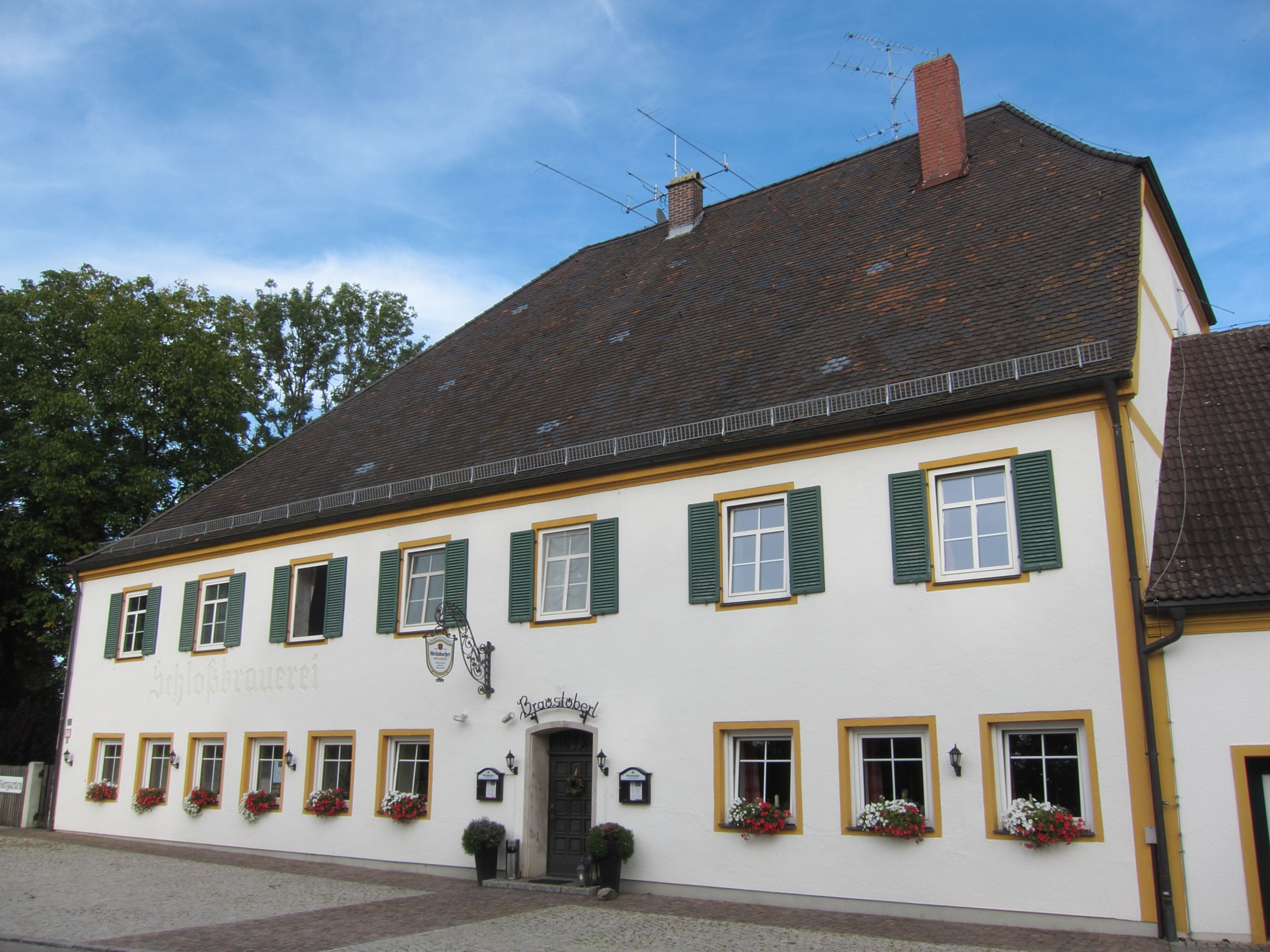 Ehem. Hofmarksschloss, ein und zweigeschossiger Vierflügelbau mit Walmdach im Stil des Biedermeier, 1794 und 1847.